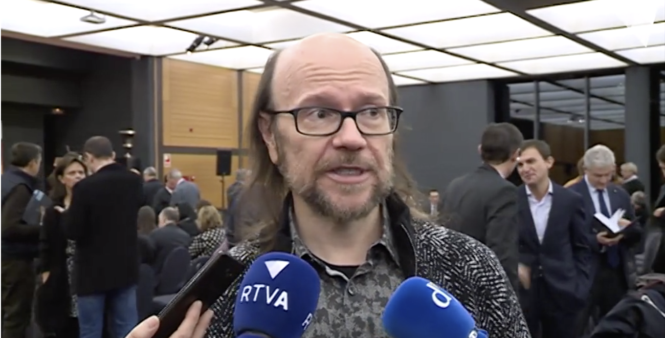 Santiago Segura, invitado sorpresa en la presentación del libro